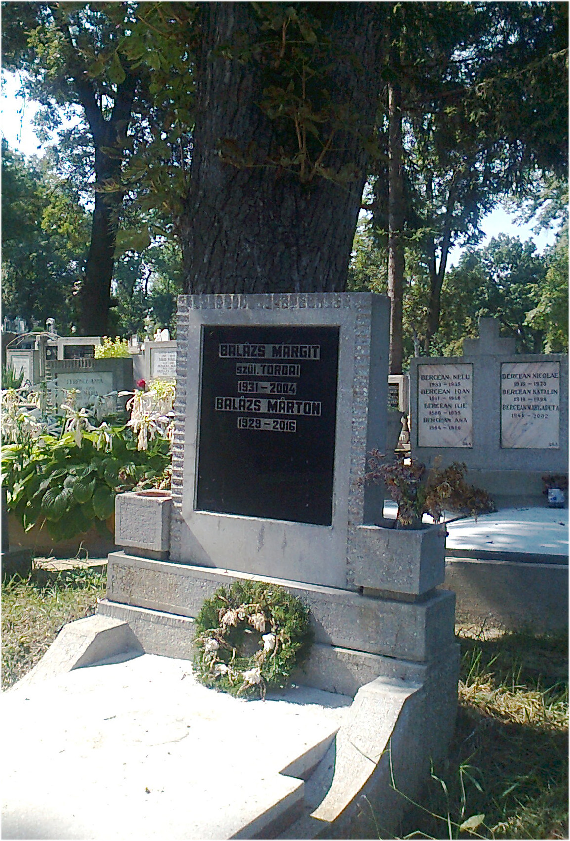 Grave of mathematician Márton Balázs (1929-2016) / Balázs Márton (1929-2016) matematikus sírja a kolozsvári Házsongárdi temetőben (III.b. parcella észak-keleti része)